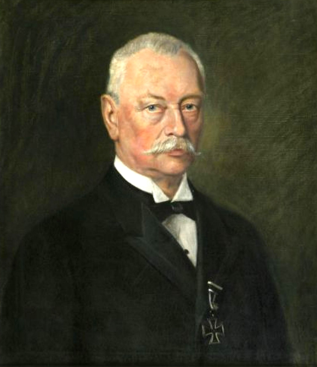 Leipzigs Oberbürgermeister Karl Rothe um 1920